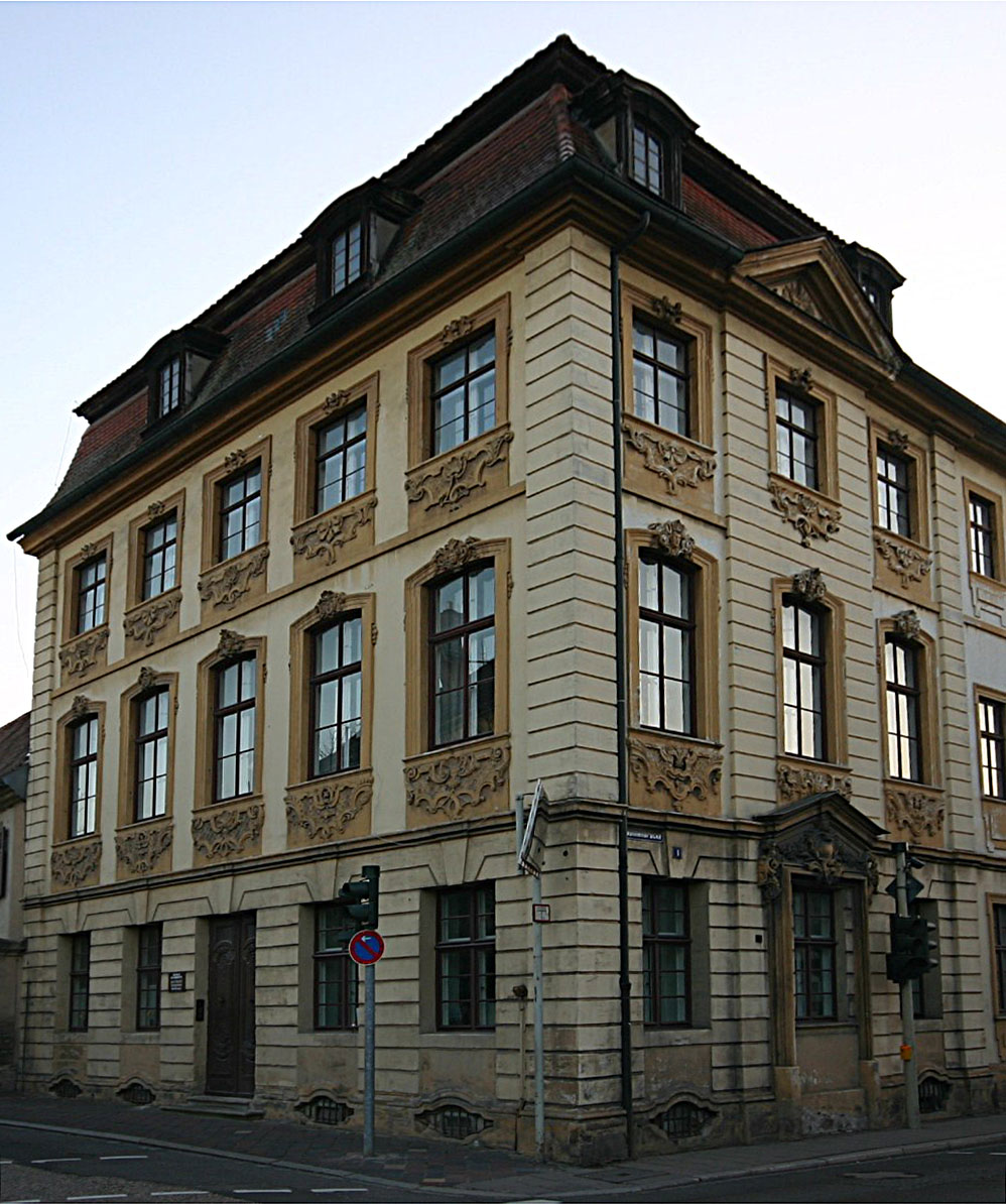 Wohnhaus Justus Heinrich Dientzenhofers, Nonnenbrücke 1, Bamberg